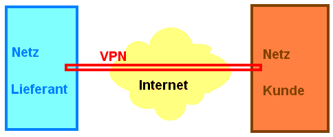 E-procurement